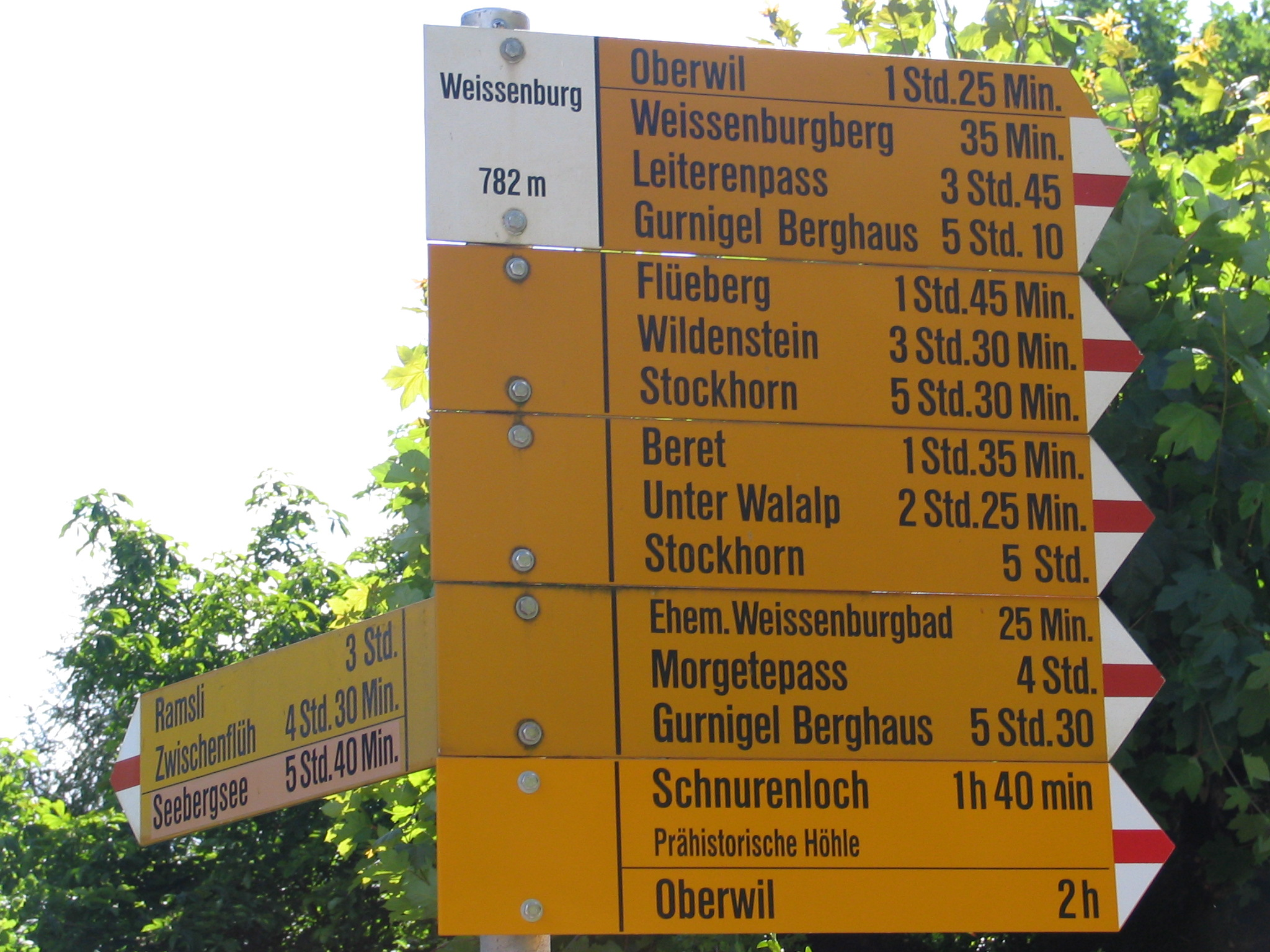 Wanderwegweiser beim Bahnhof Weissenburg im Simmental (Kanton Bern, Schweiz/Switzerland) mit Zeitangaben in Stunden